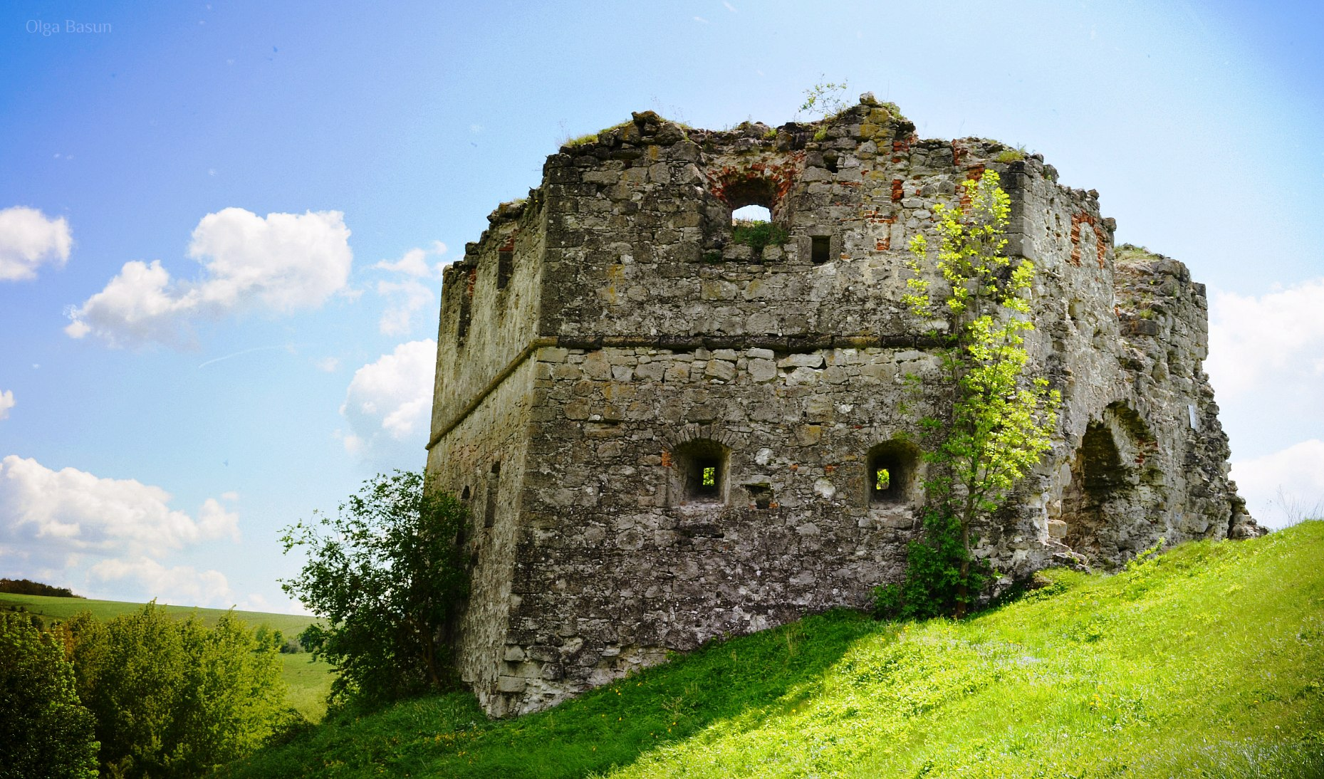 Сутковецький замок — залишки